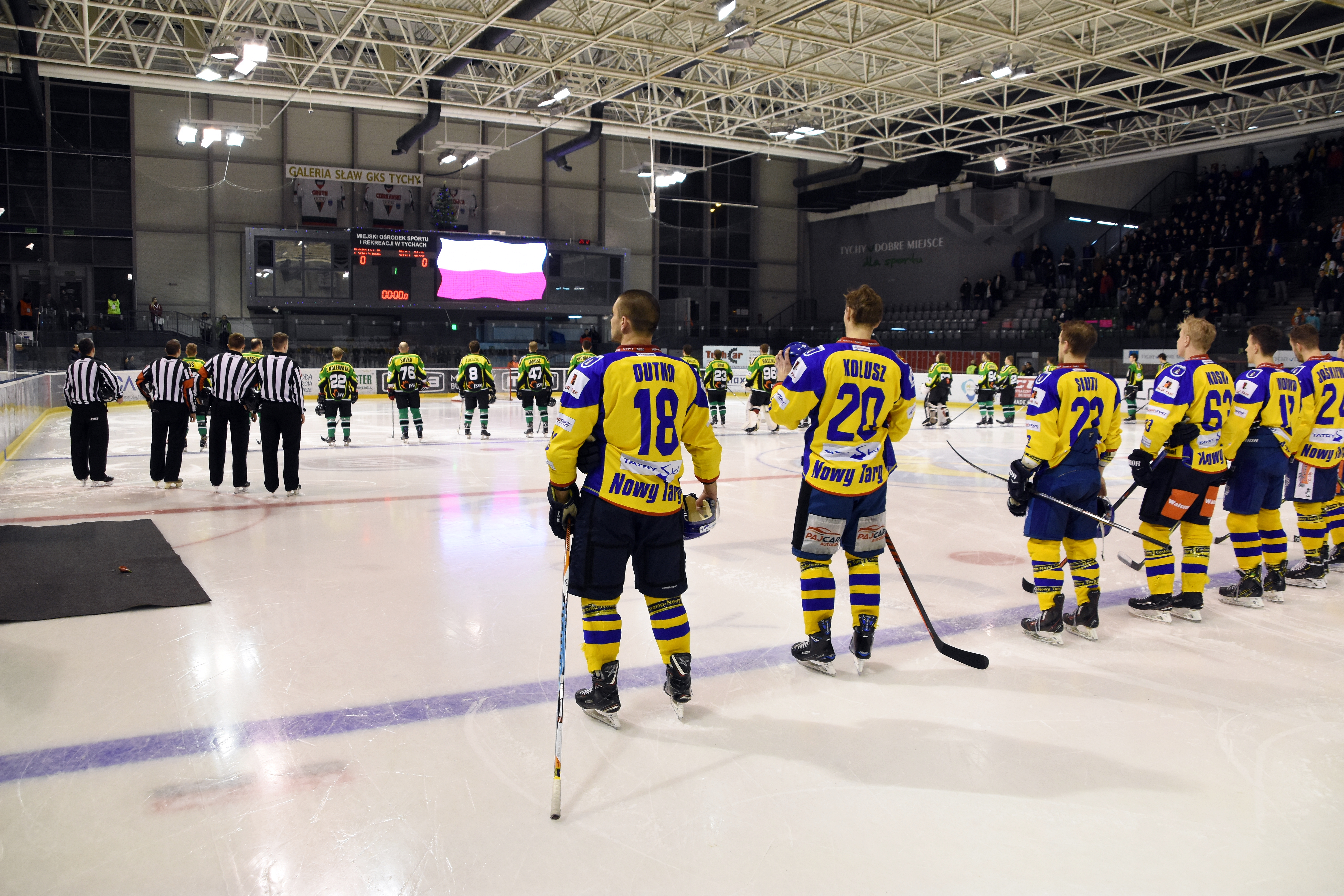 PP JKH Jastrzębie - Podhale Nowy Targ